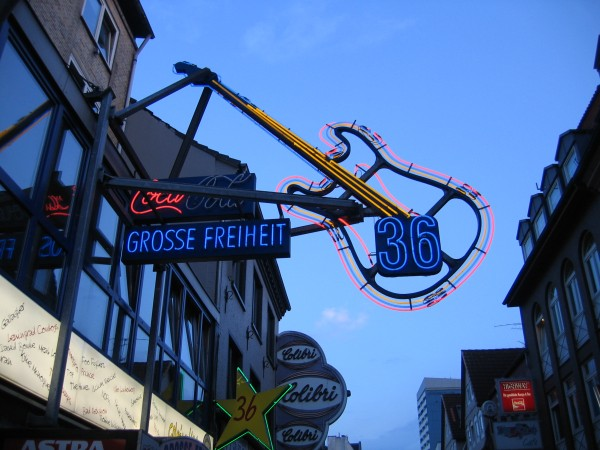 Die E-Gitarren-Leuchtreklame über dem Haupteingang des Musikclubs "Große Freiheit 36" in der gleichnamigen Straße in St. Pauli.